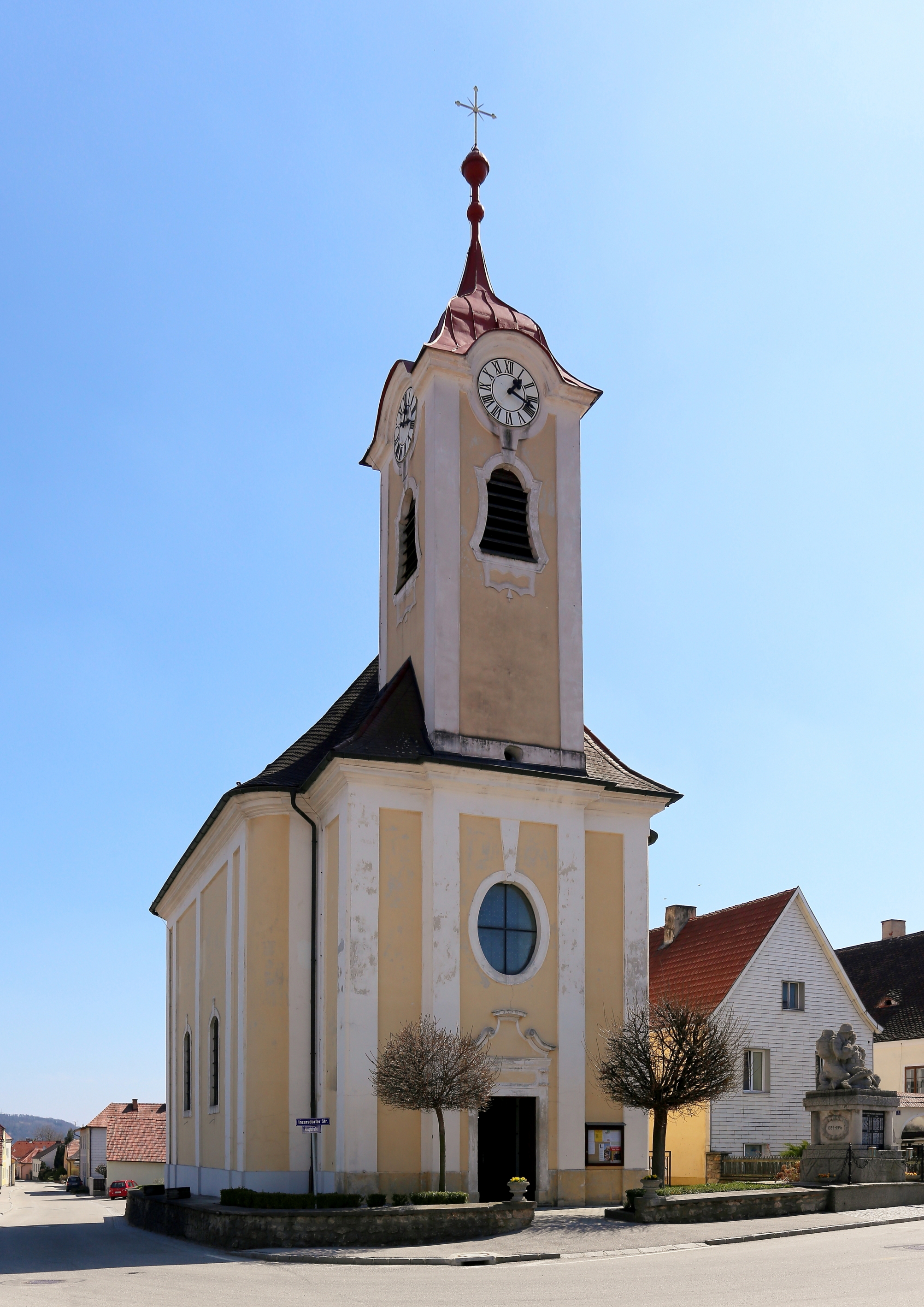 Katholische Pfarrkirche hl. Michael in Getzersdorf, ein Ortsteil der niederösterreichischen Gemeinde Inzersdorf-Getzersdorf. Ein schlichter spätbarocker Bau aus der 2. Hälfte des 18. Jahrhunderts mit einem westseitigen Fassadenturm und einem eingezogenen Chor im Osten.